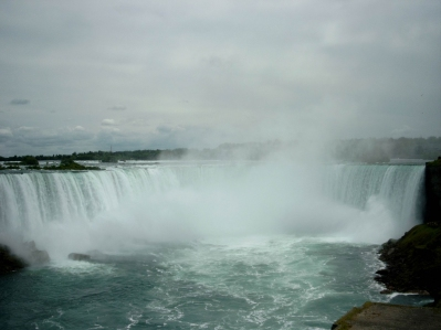 Niagara Falls prive foto; zomer 2003; Karel Pieterse 16 aug 2003 10:47 (CEST)